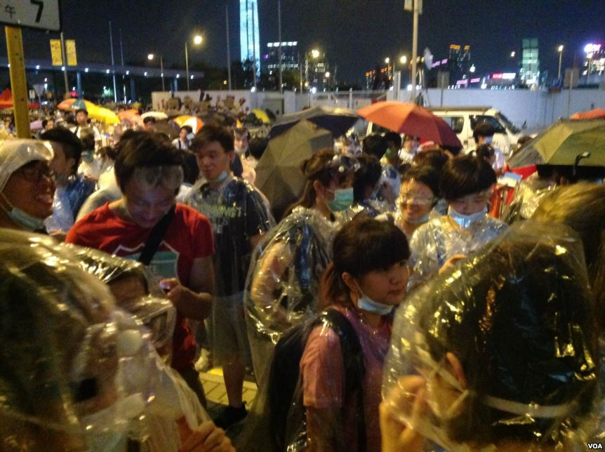 中文（台灣）: 港警方清場公民廣場 外界批使用過分武力